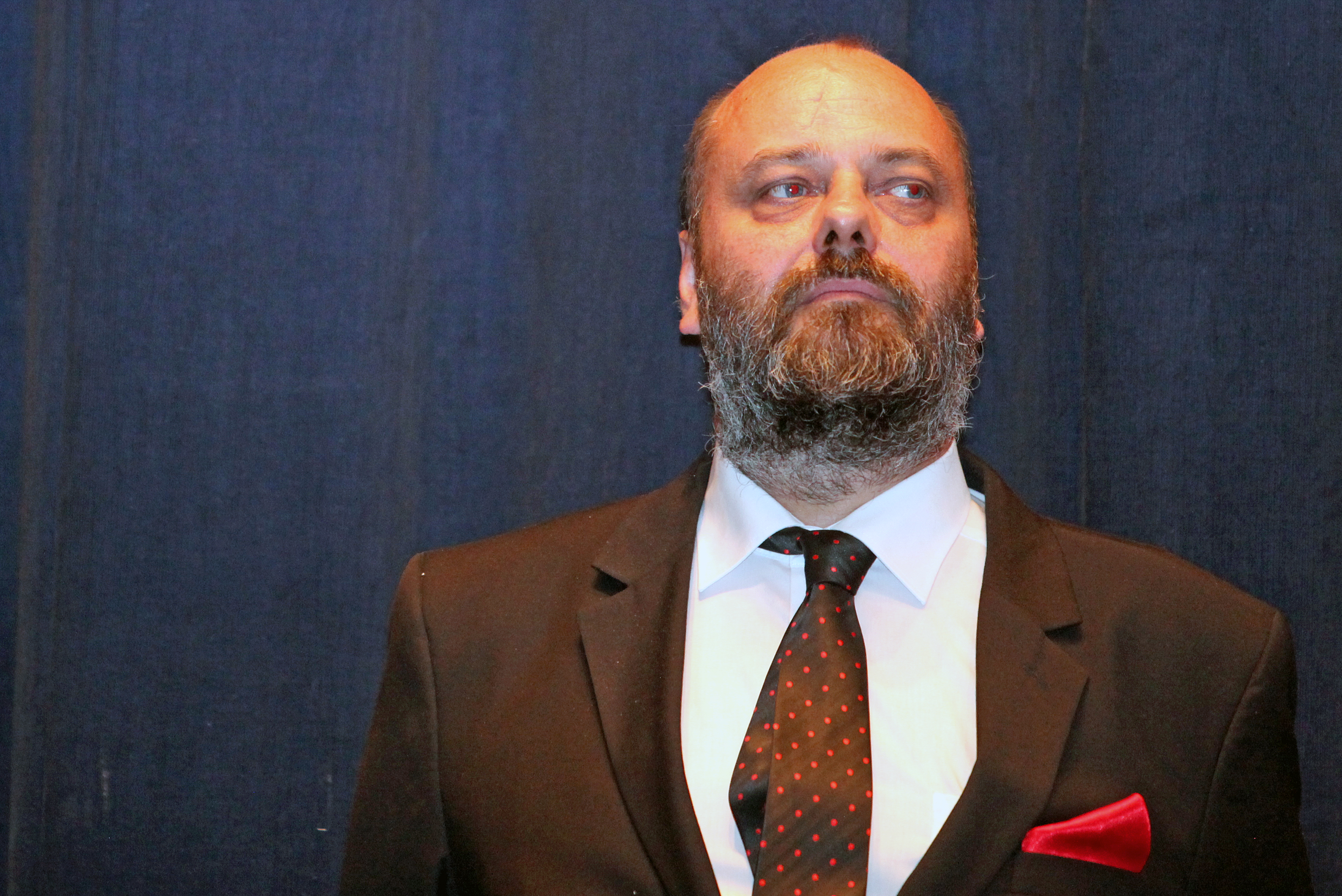 Der tschechische Drehbuchautor und Dramaturg Petr Jarchovský beim 51. Internationalen Filmfestival Karlovy Vary.